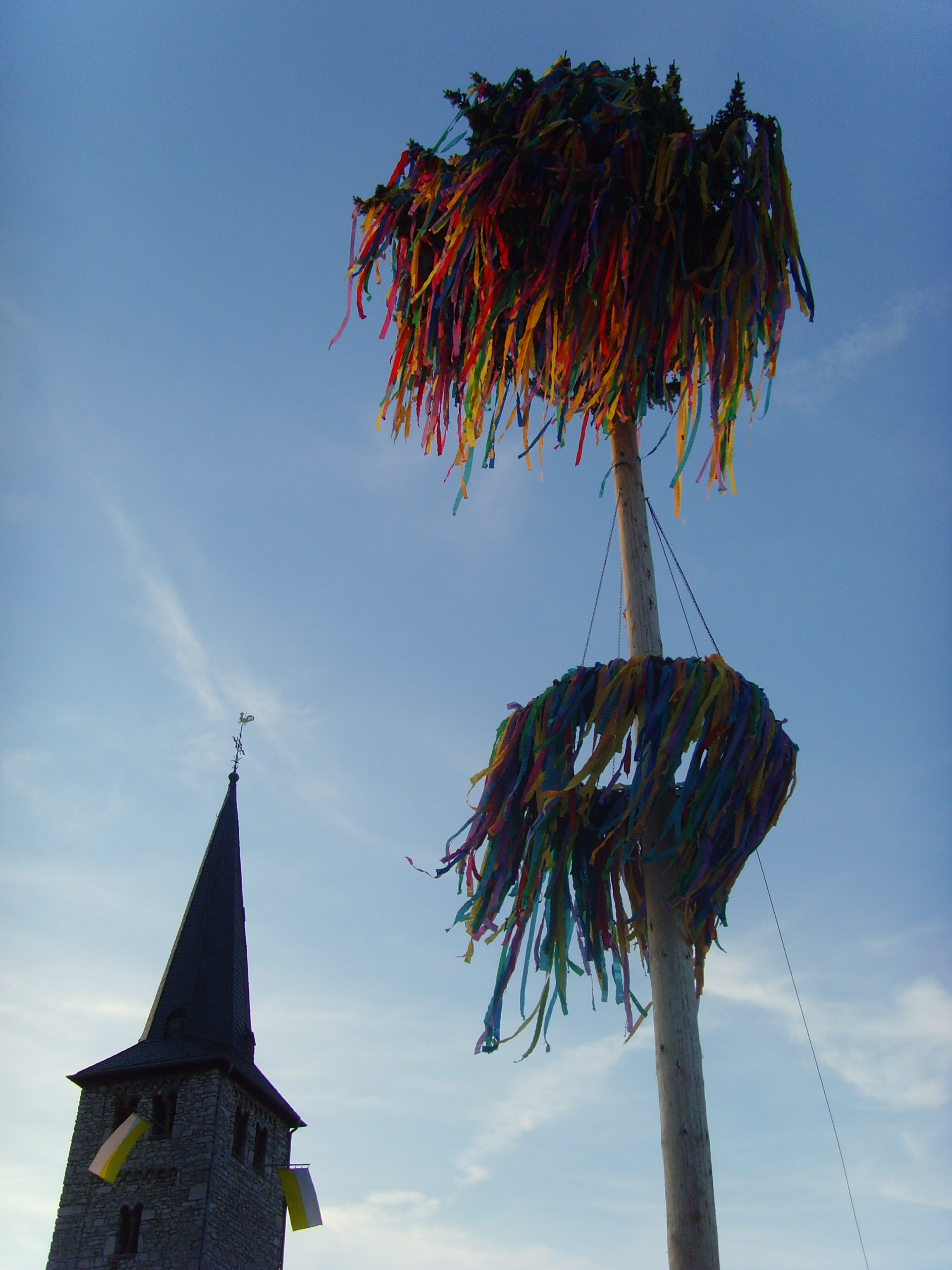 Kirmesbaum und Kirche 2008, selbst fotografiert